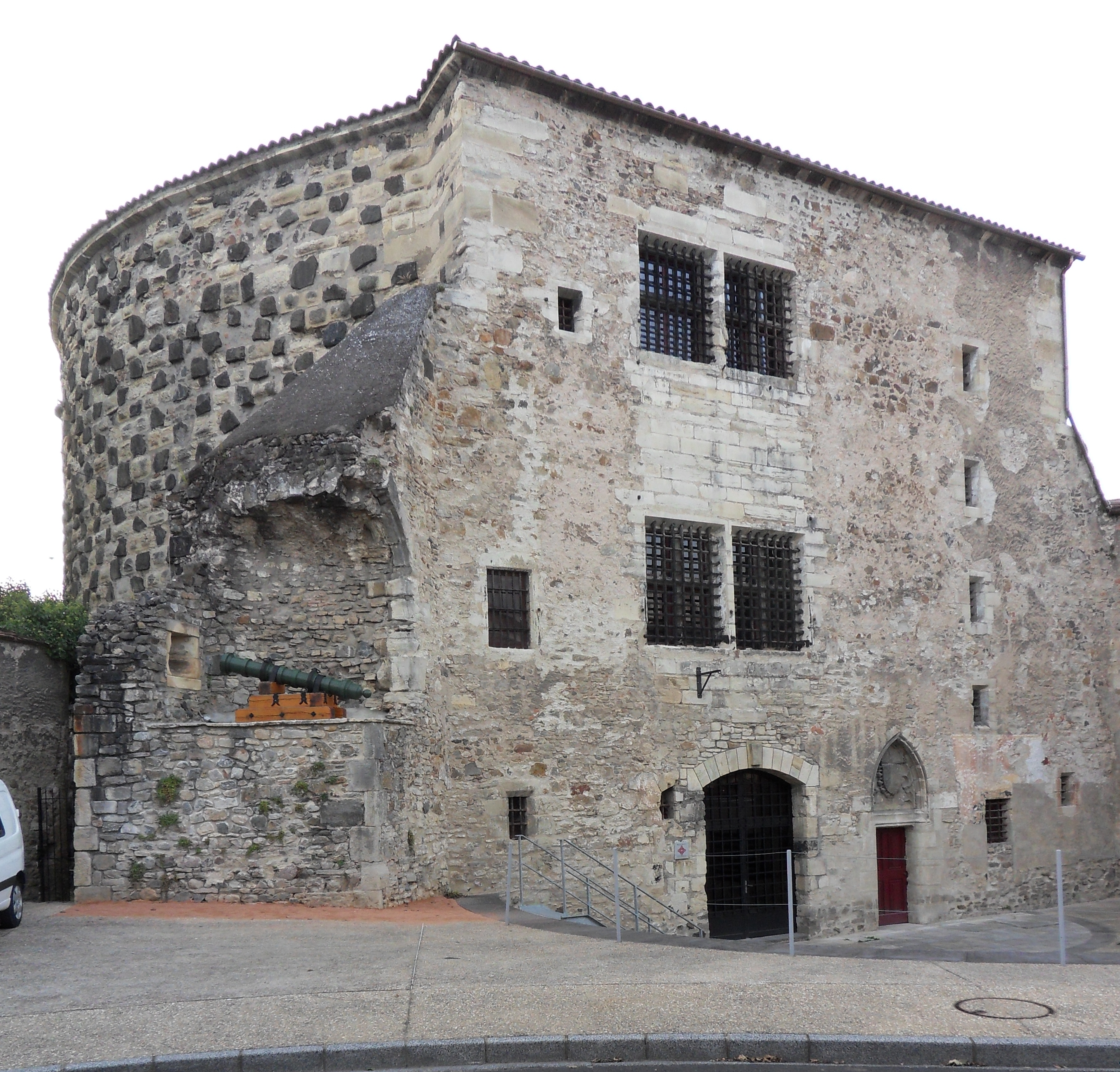 Fortifications, Place de la RépubliqueCours Saturnin-Arloing (Inscrit, 1996) Vestige des fortifications, ancienne prison .